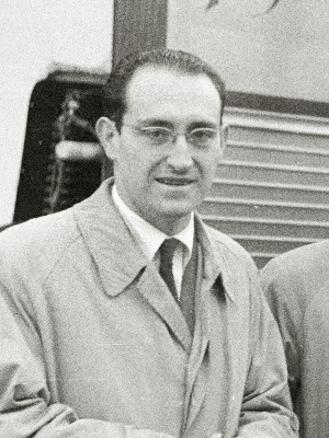 Título original: Llegada de vagónes del 'Talgo' al puerto de Pasaia (26/29) Localización: Pasajes (Guipúzcoa)